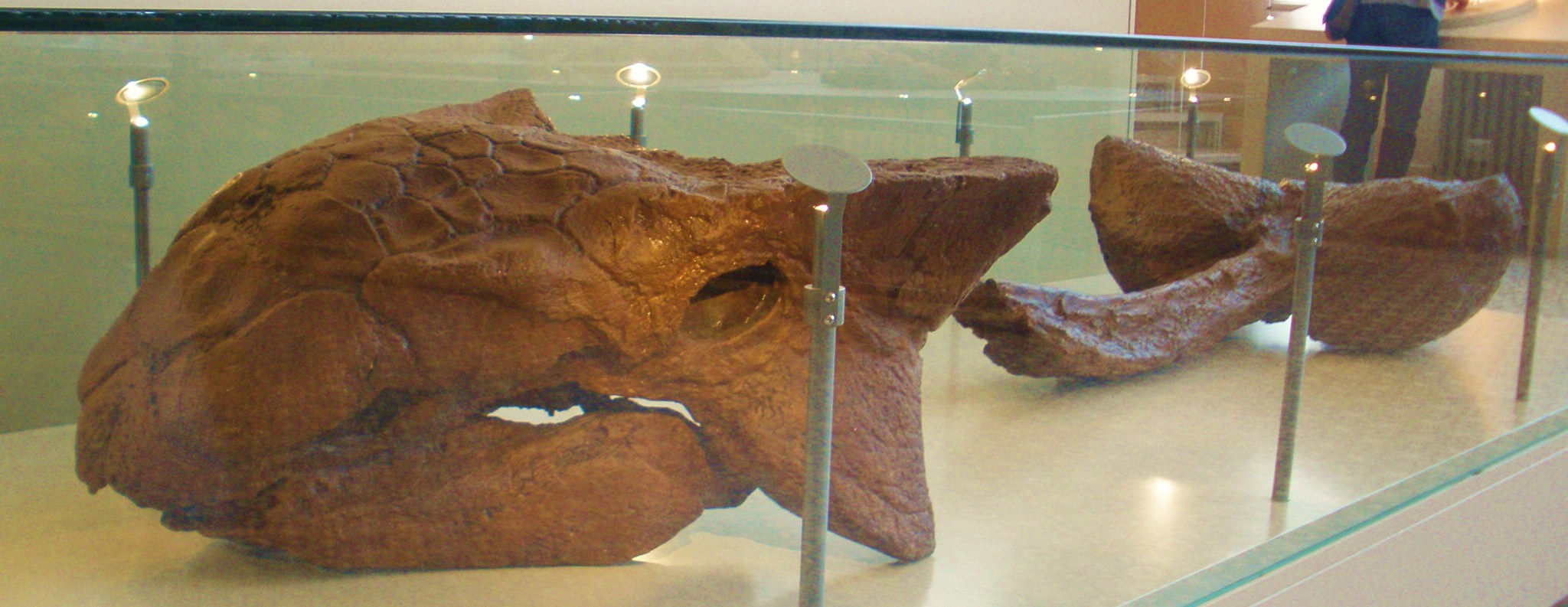 Skull cast of Ankylosaurus (specimen AMNH 5214) and tail of Anodontosaurus (specimen AMNH 5245), ankylosaurid dinosaurs. Took the photo at Musee d'Histoire Naturelle, Brussels